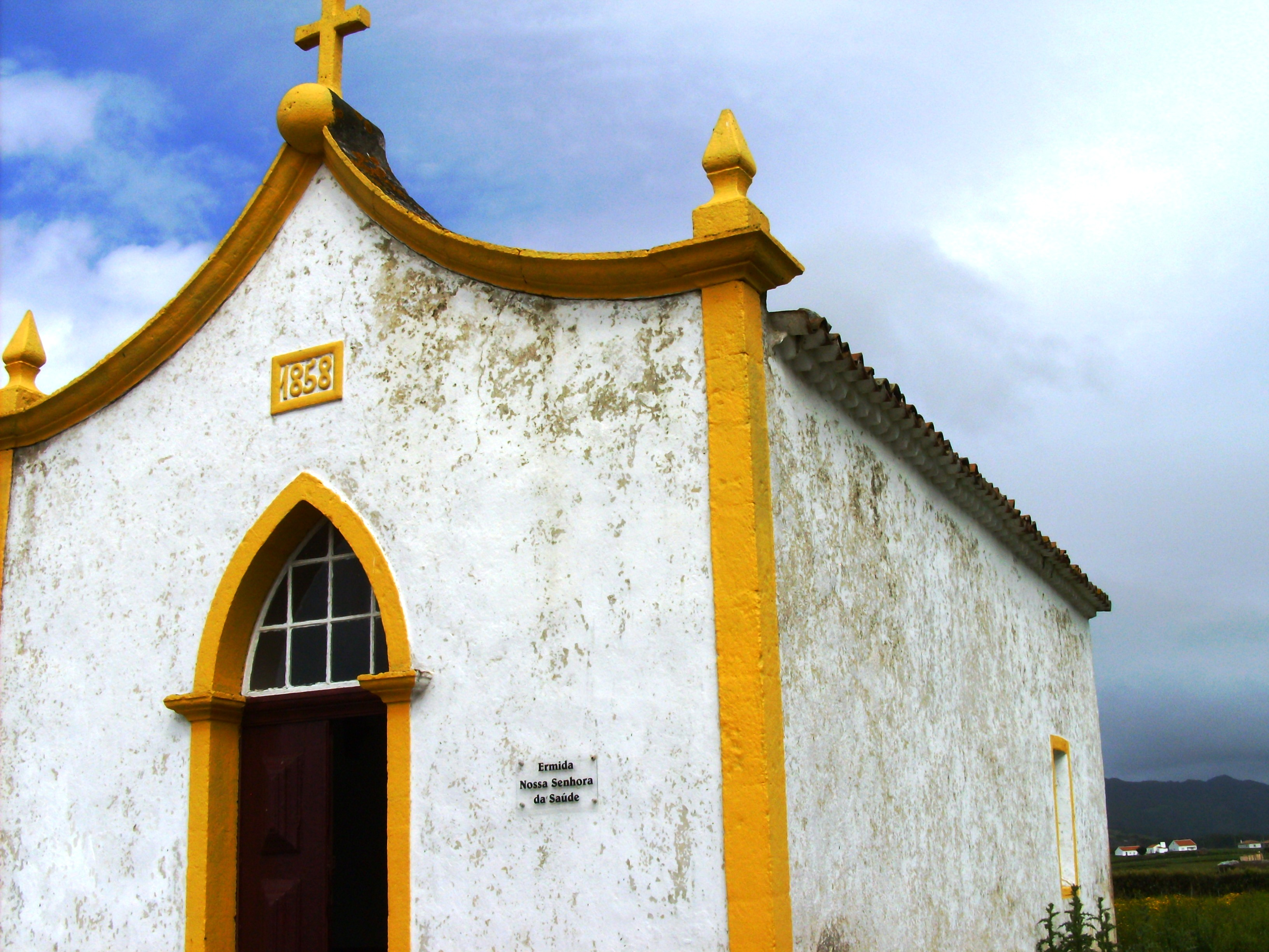 Ermida de Nossa Senhora da Saúde, Ilha de Santa Maria (Açores), Portugal.